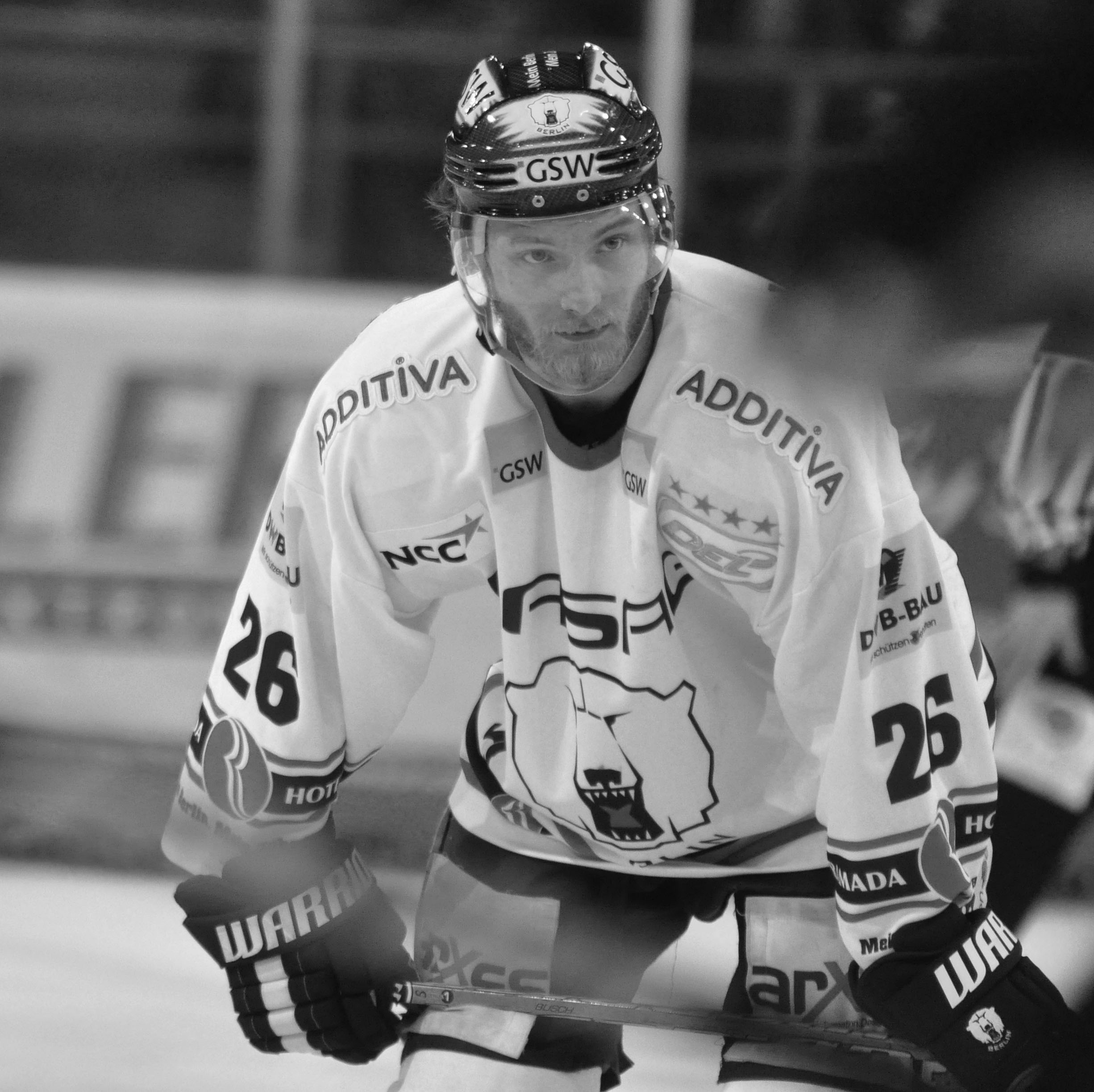 Straubing Tigers - Eisbären Berlin 11.04.2012 DEL PlayOff Halbfinale